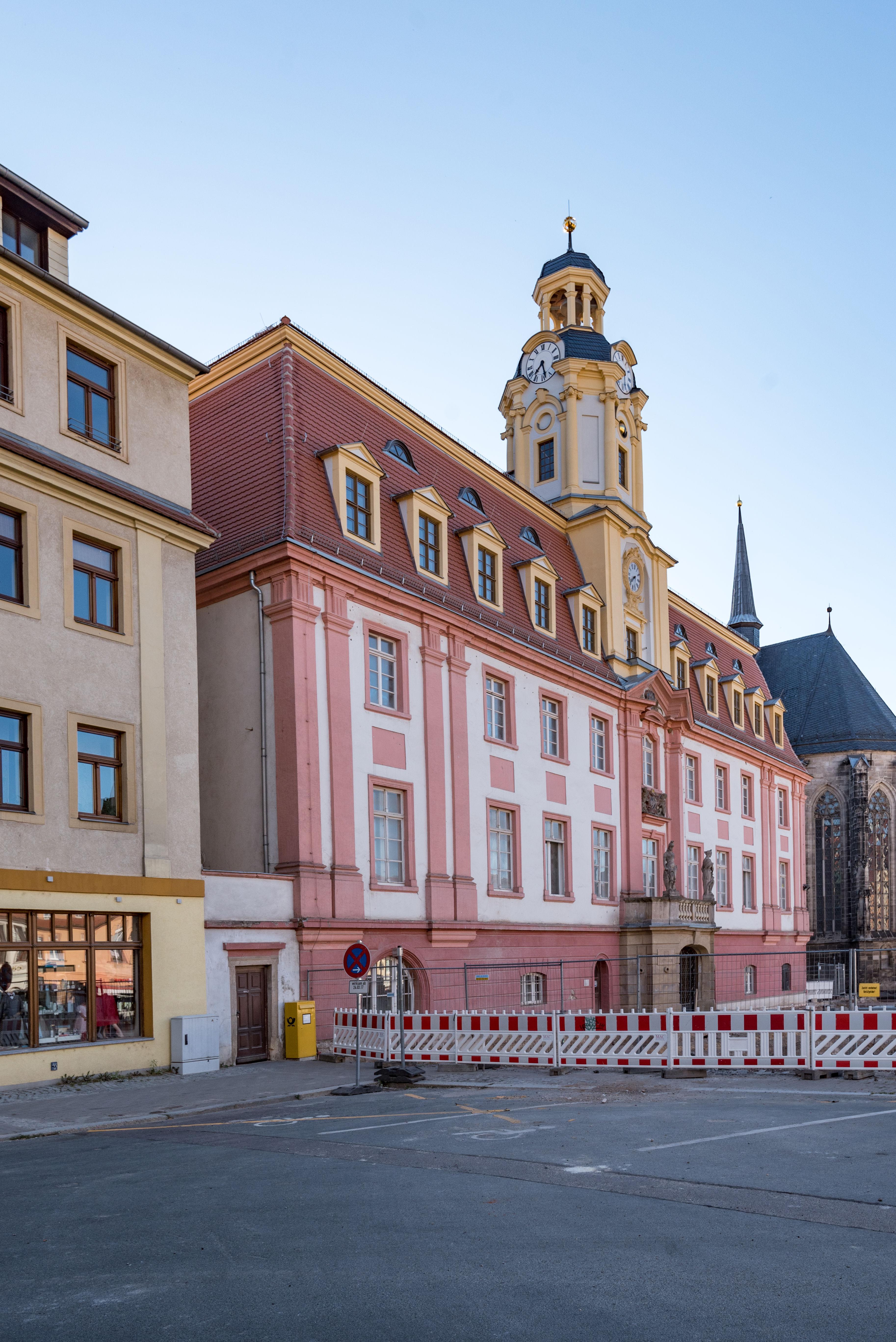 Weißenfels, Markt 1